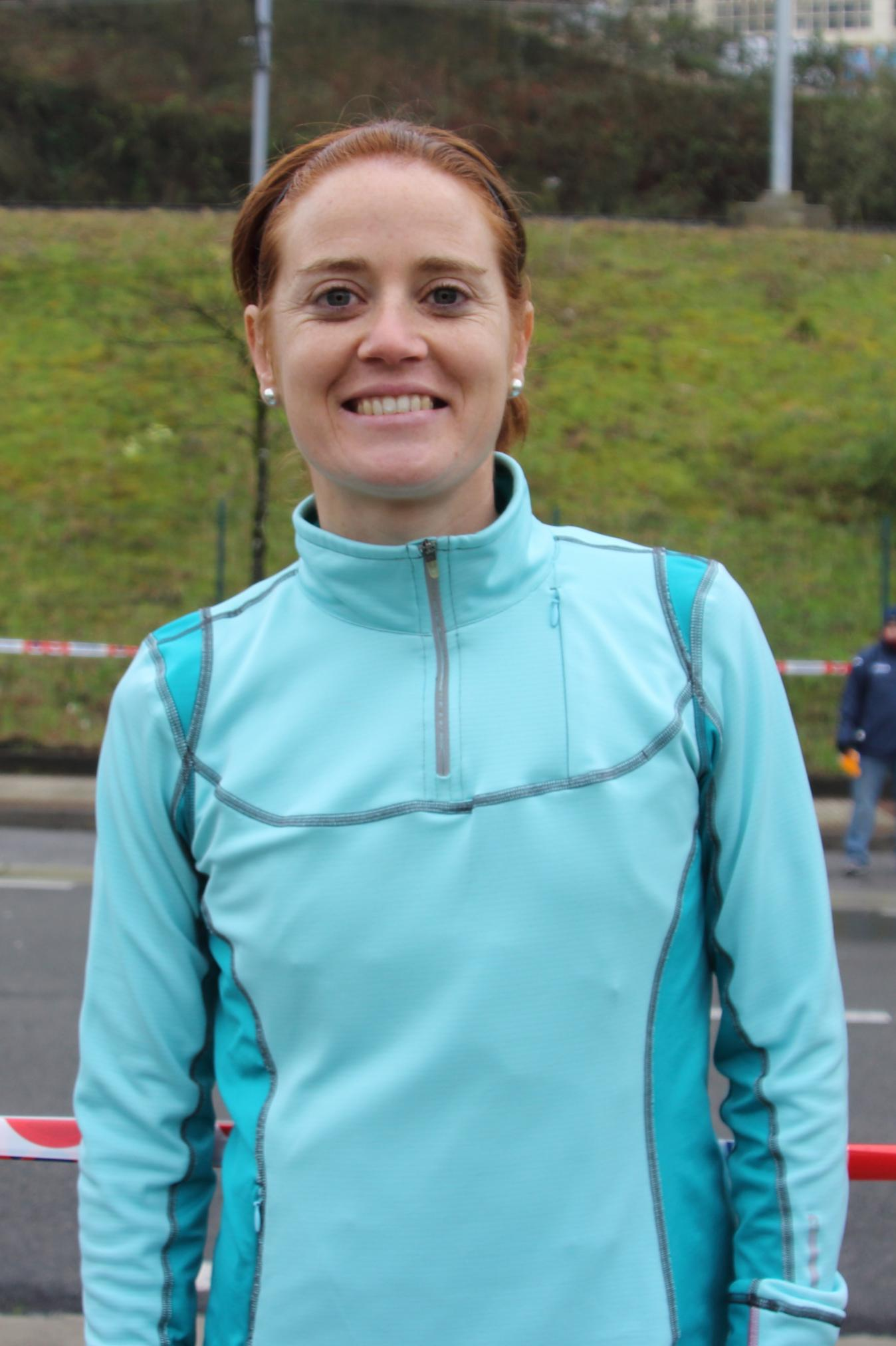 María José Poves Novella, marchadora española. Ha participado en los Juegos Olímpicos de 2008 y 2012. Fotografía realizada en durante la celebración del Critérium RFEA de Marcha Atlética, celebrado en Rentería el 22 de marzo de 2015.